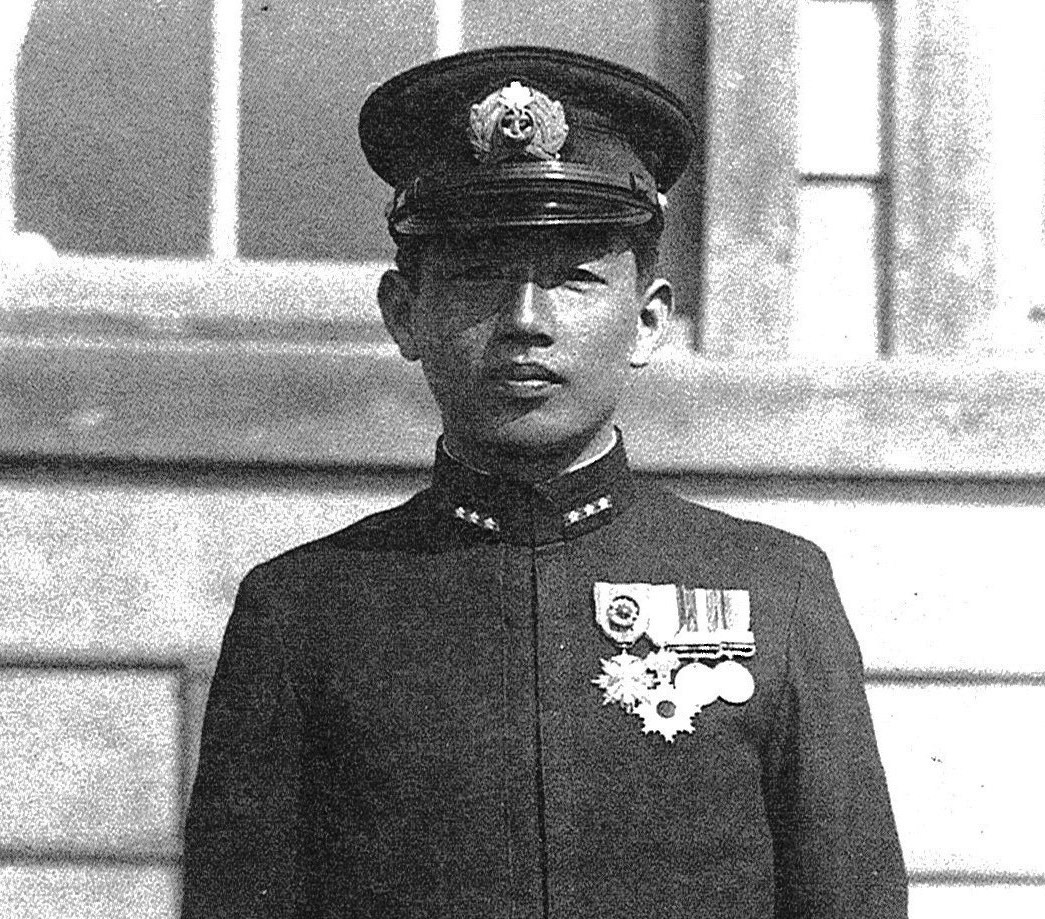 1942年、大分航空隊での鈴木實